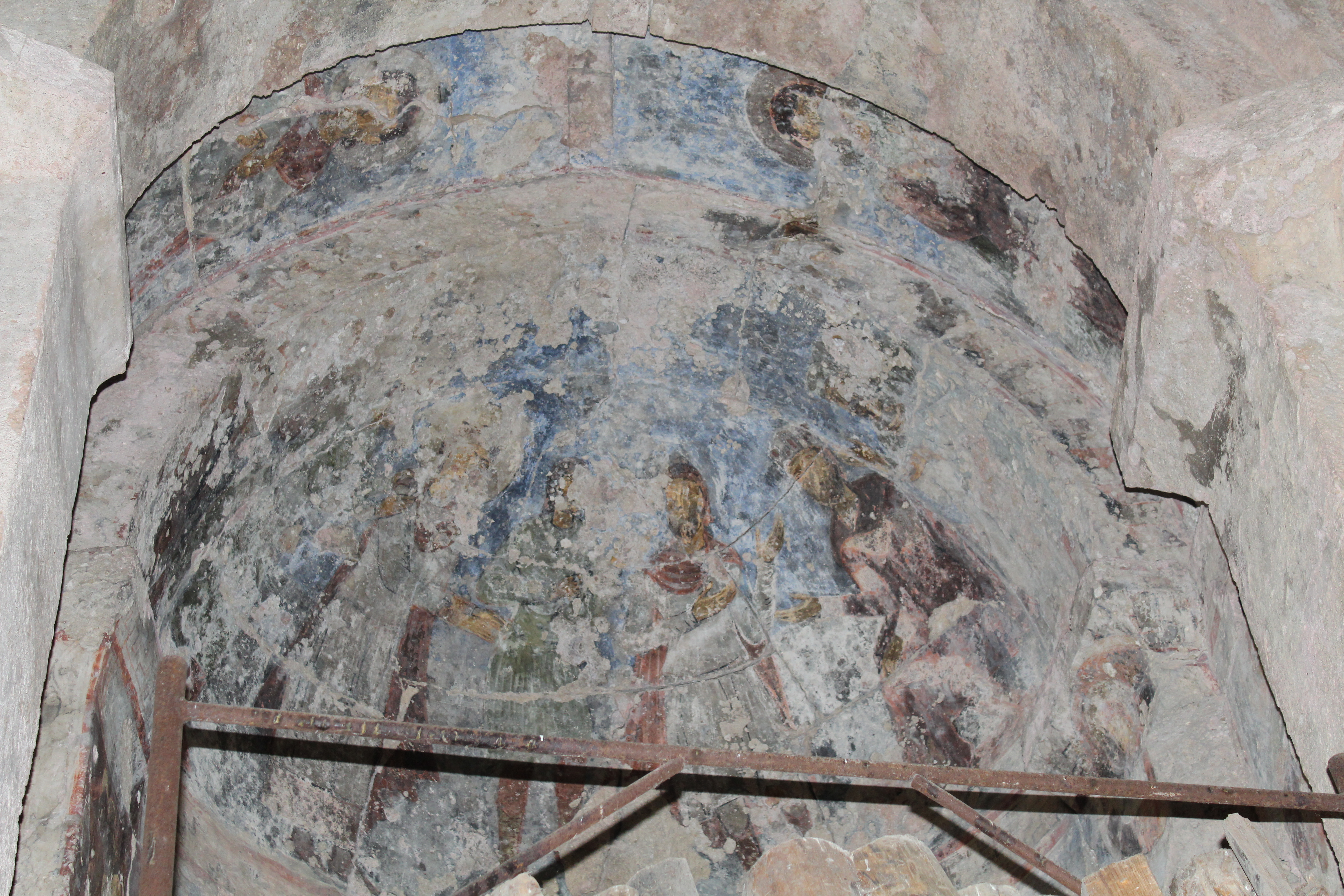 წმ. გიორგის ეკლესია